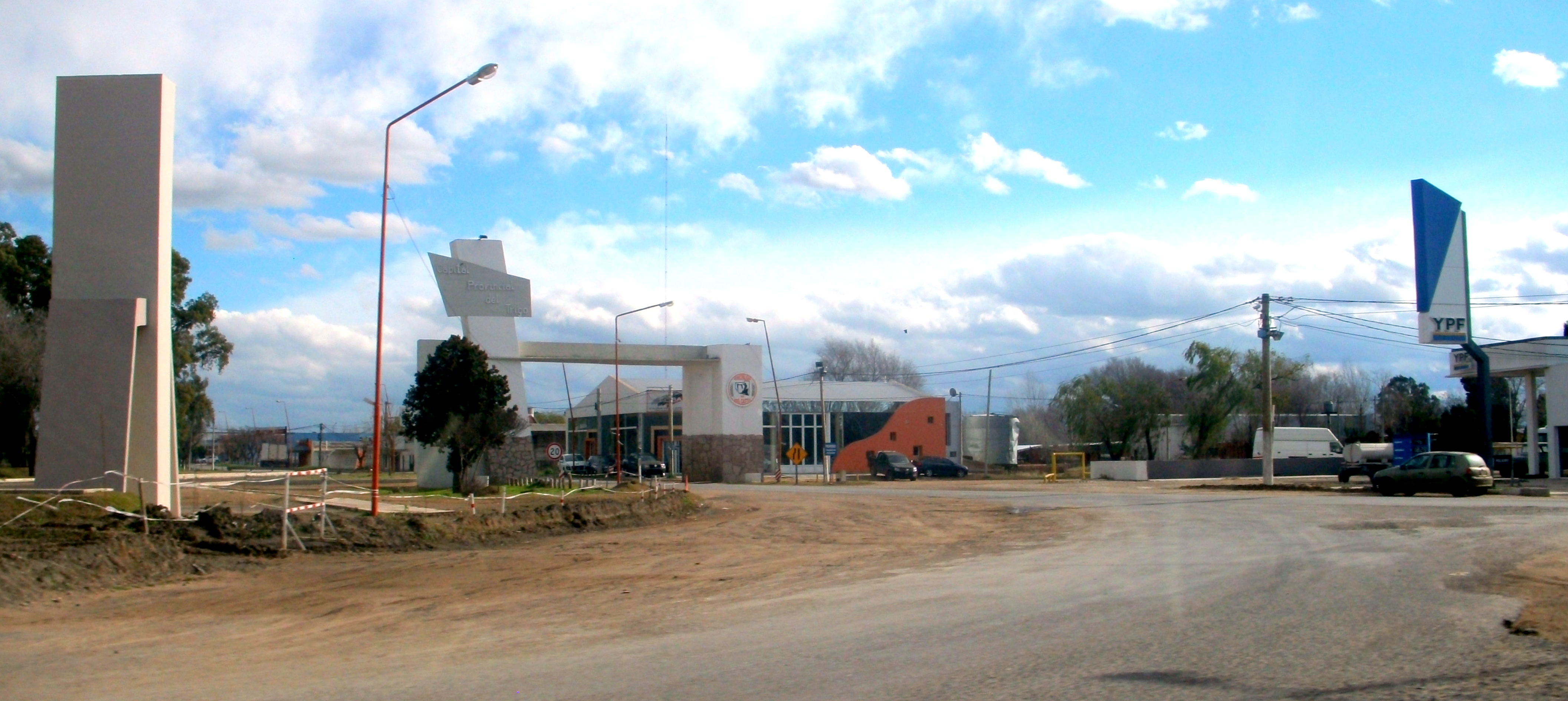 Entrada al pueblo